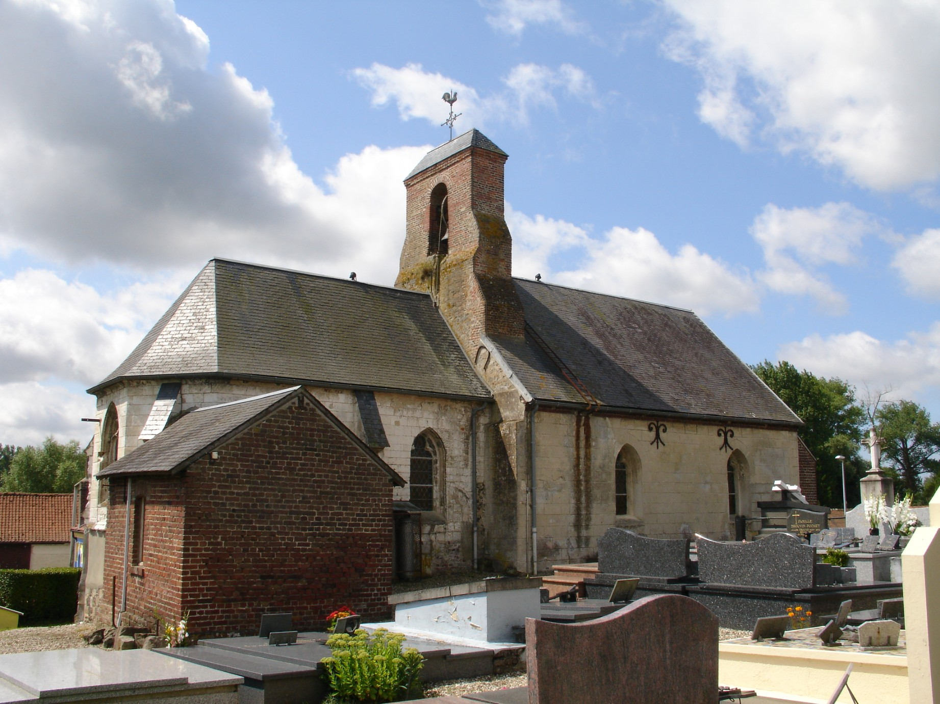 Église de Beutin